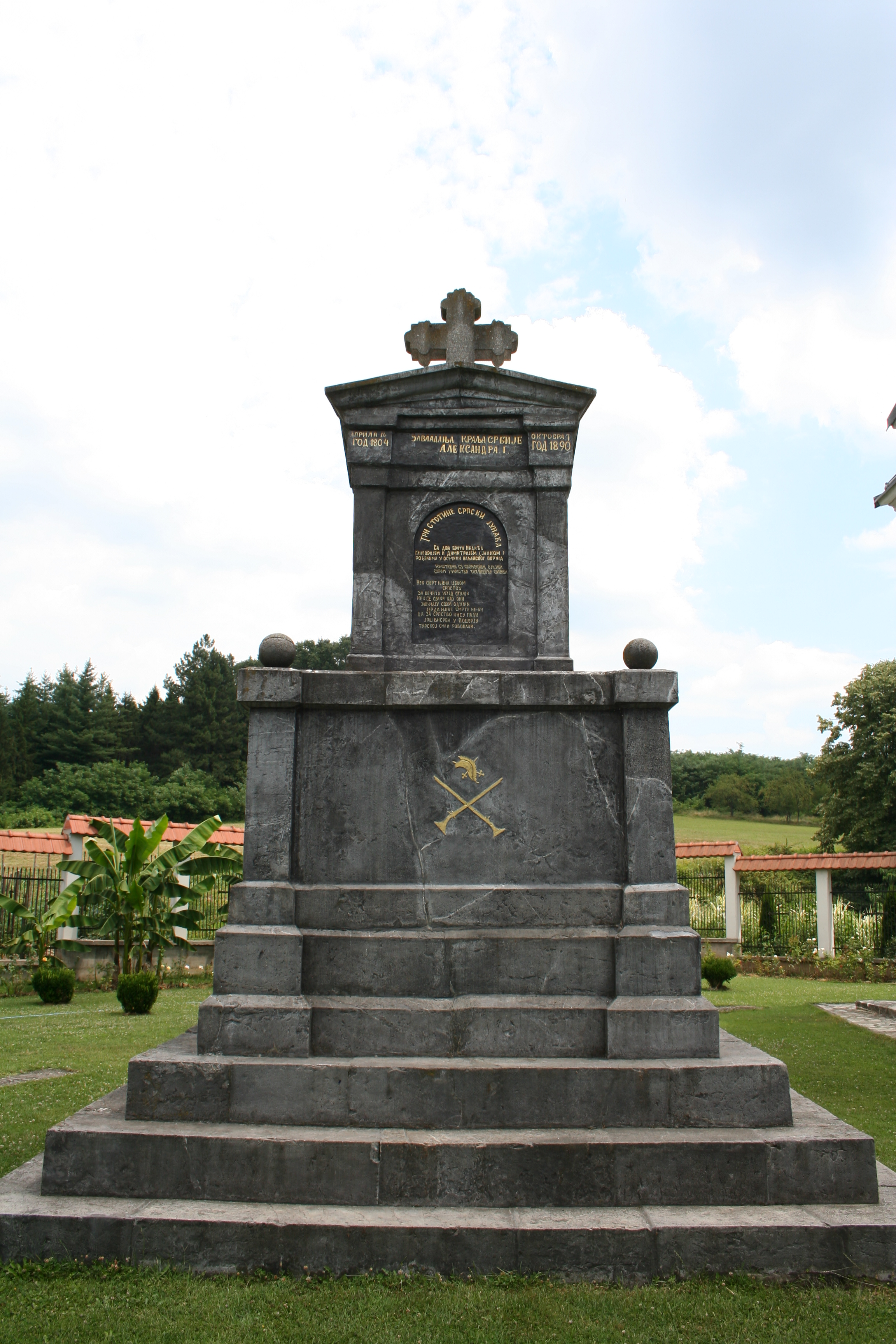 Manastir Čokešina